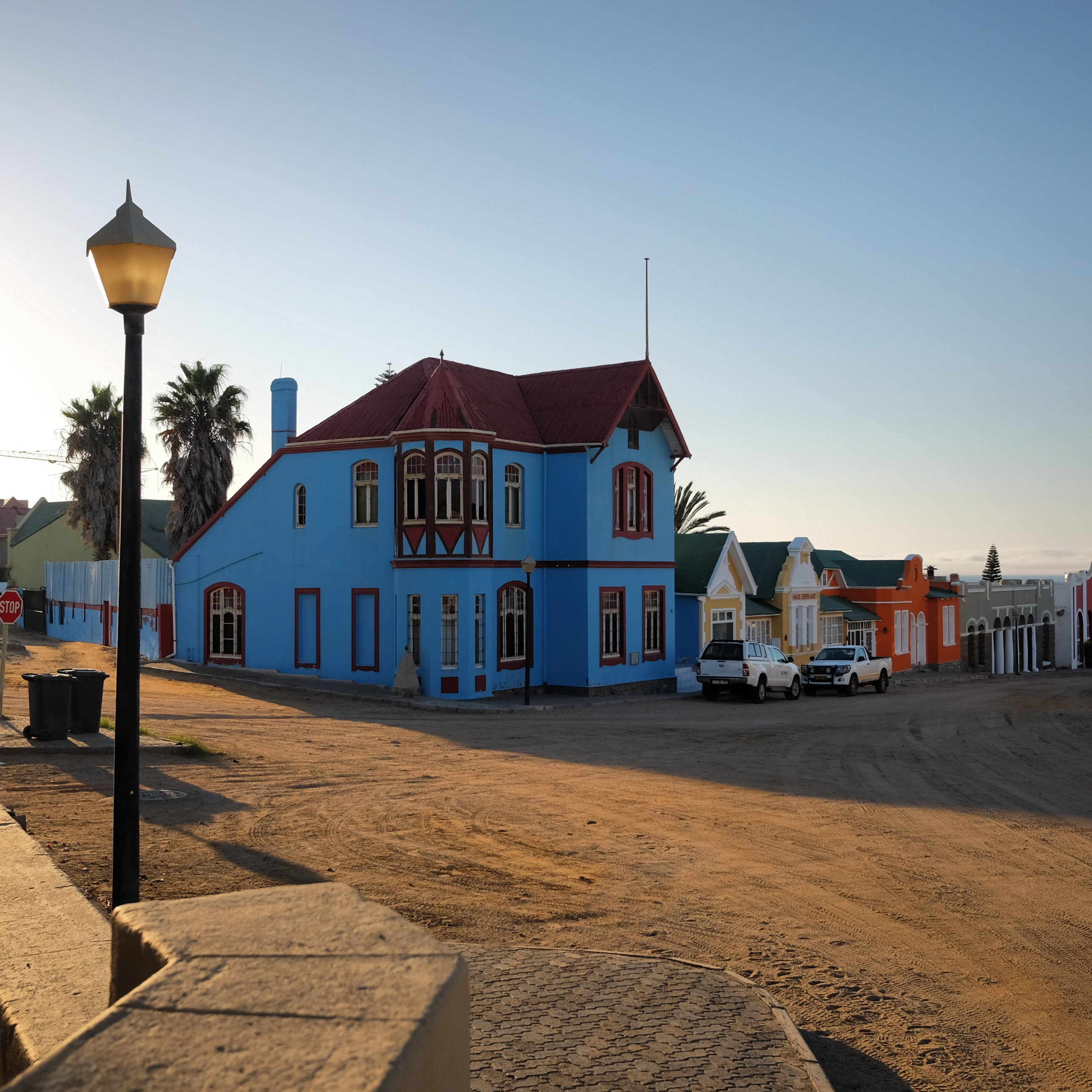 Namibia, Lüderitz, Bergstrasse.